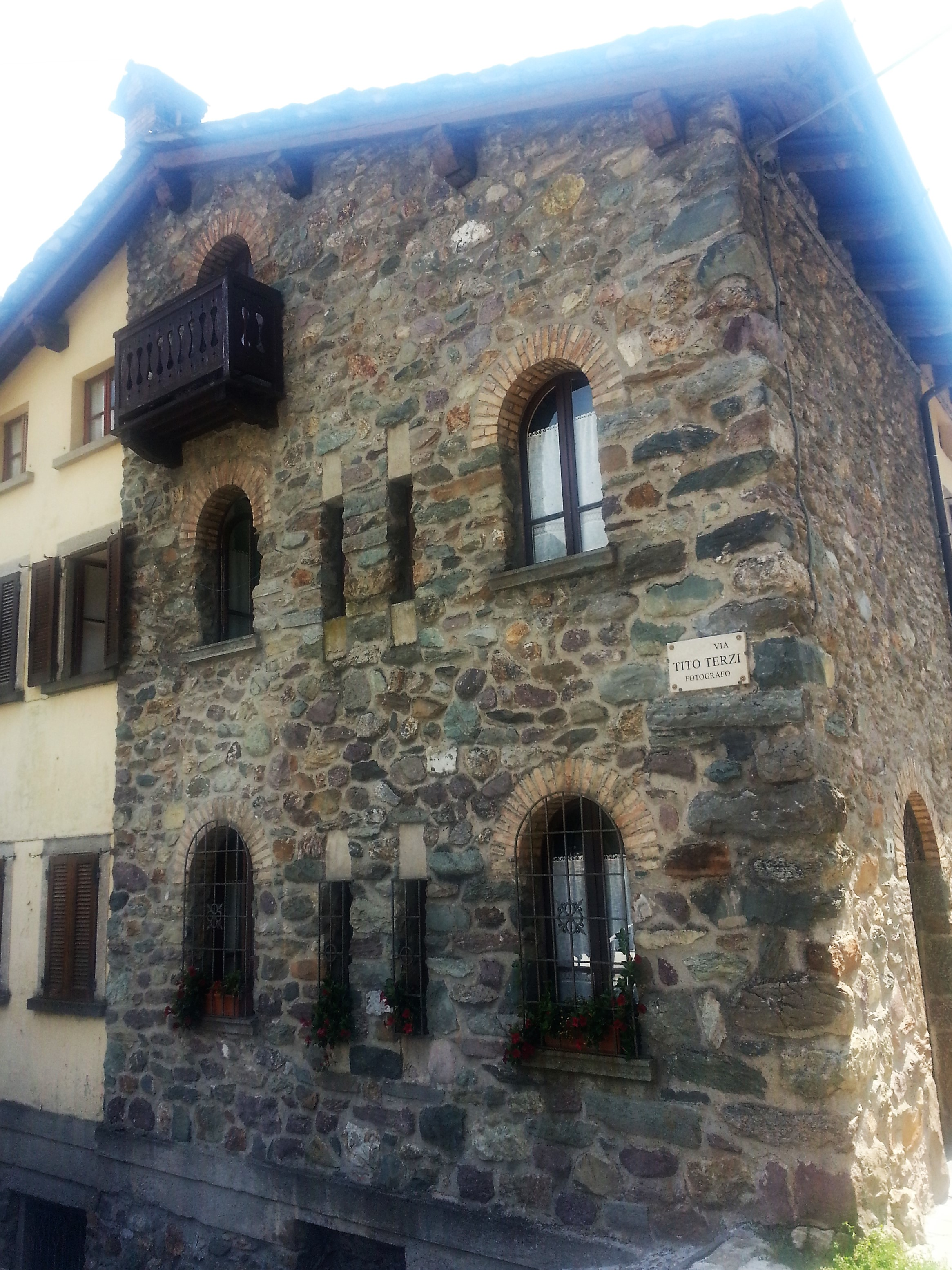 La intotolata al fotografo Tito Terzi